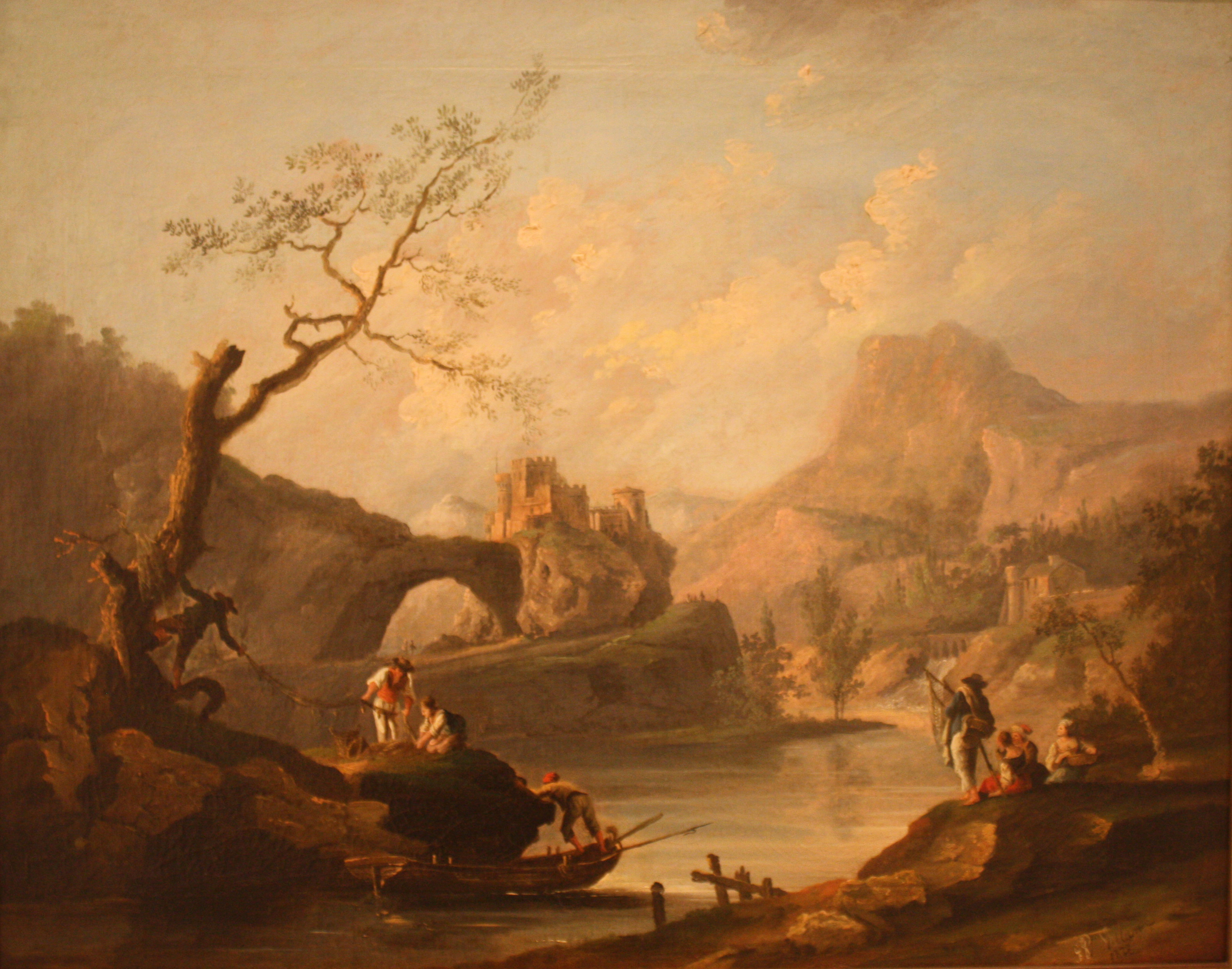 Jenaro Pérez Villaamil (1807-1854): "Paisaxe con río, castelo e escena de pescadores" (1828). Exposto no Museo de Pontevedra.